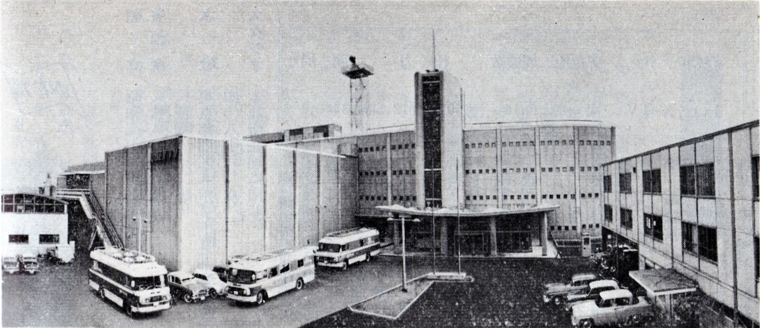 日本教育テレビ（テレビ朝日）の1961年当時の本社屋（のちの六本木センター）